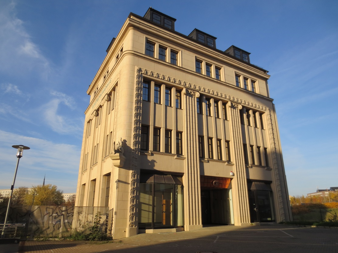 ehemaliges Kunstgewerbehaus in Chemnitz, Dresdner Straße 11; erbaut 1913 nach Entwurf von Willy Schönefeld; unter Denkmalschutz